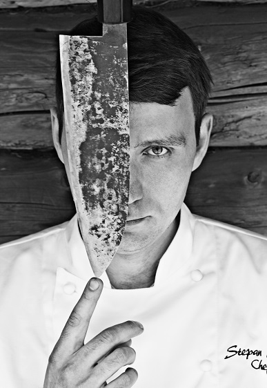 Stepan Jarts